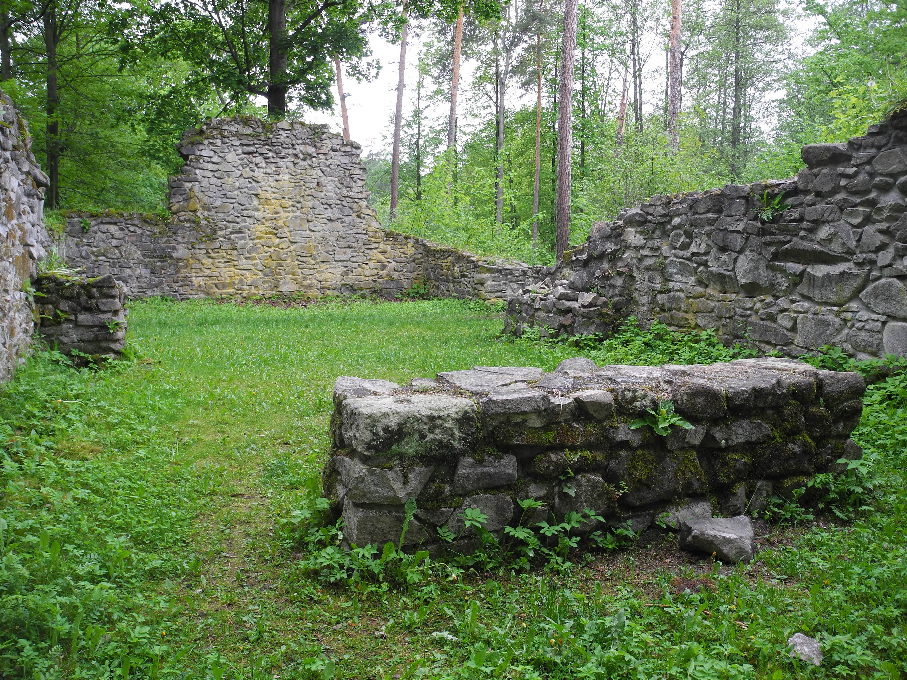 Ruine der Sankt-Leonhard-Kirche in Karlsbad (Karlovy Vary)